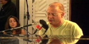 Músico brasileiro Guilherme Arantes em imagem do acervo da TV Brasil.